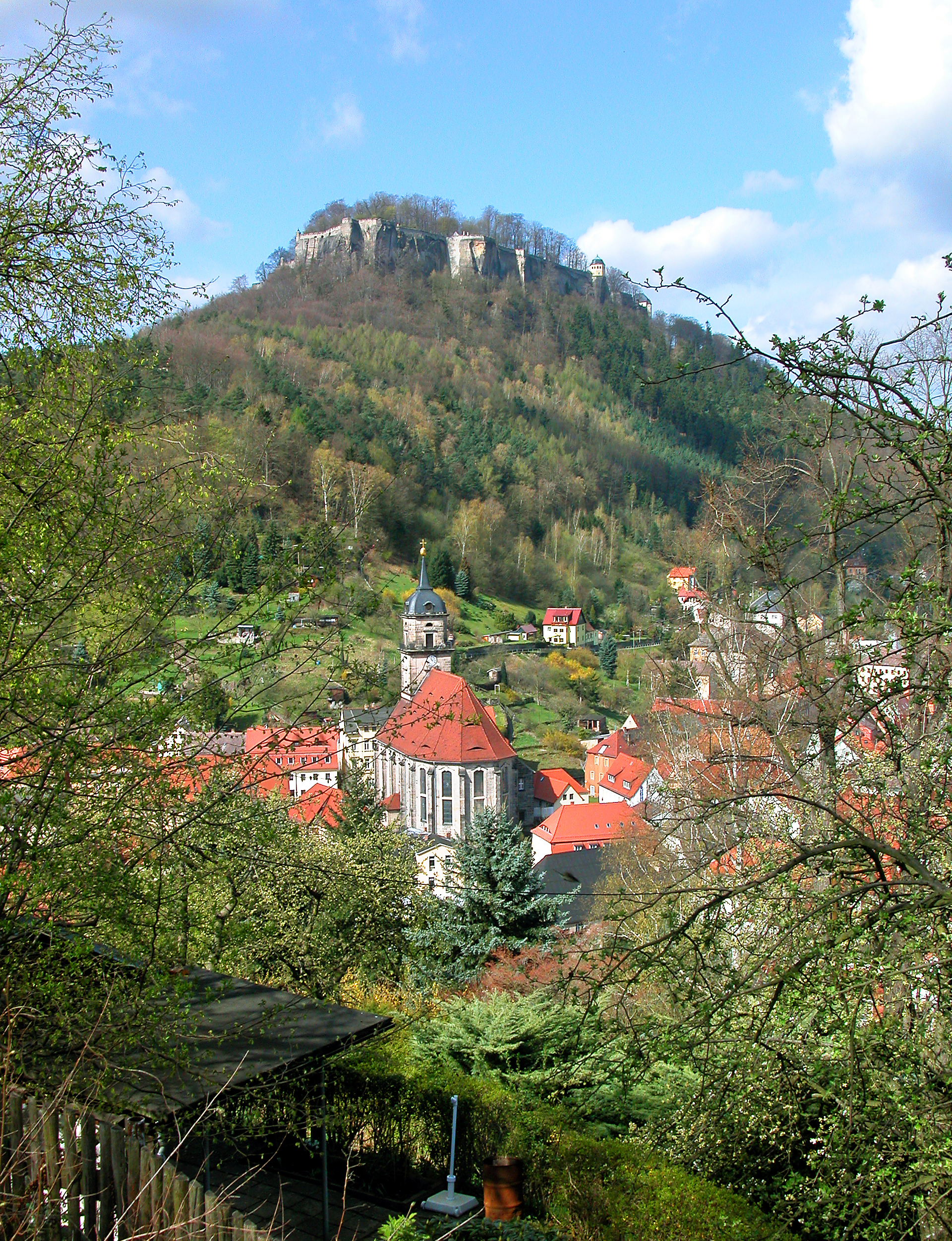 13.04.2008 01824 Königstein / Sächsische Schweiz: Blick von Osten über die Stadt zur Festung Königstein (GMP: 50.919187,14.056767). [DSCN32186.TIF]20080413030DR.JPG(c)Blobelt